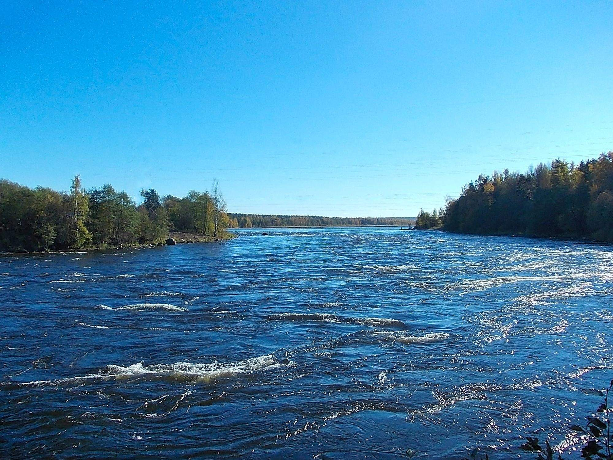 Вуокса в Лосево